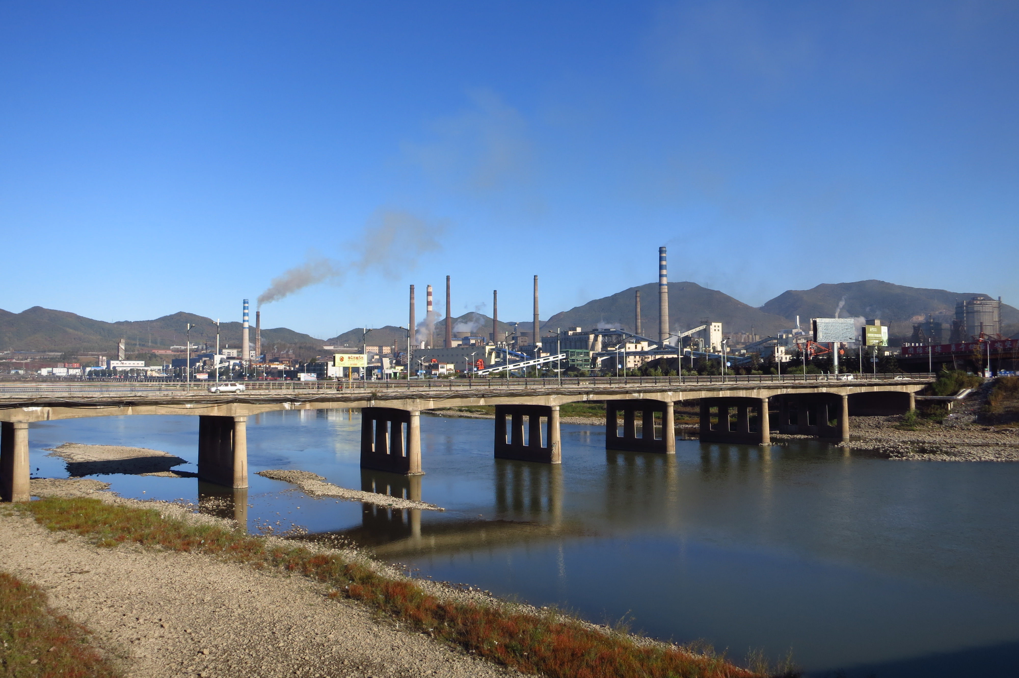 巡道工出品 photo by xundaogong 通化钢铁厂